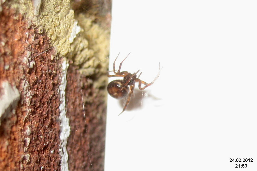 Steatoda bipunctata - snovačka pokoutní.